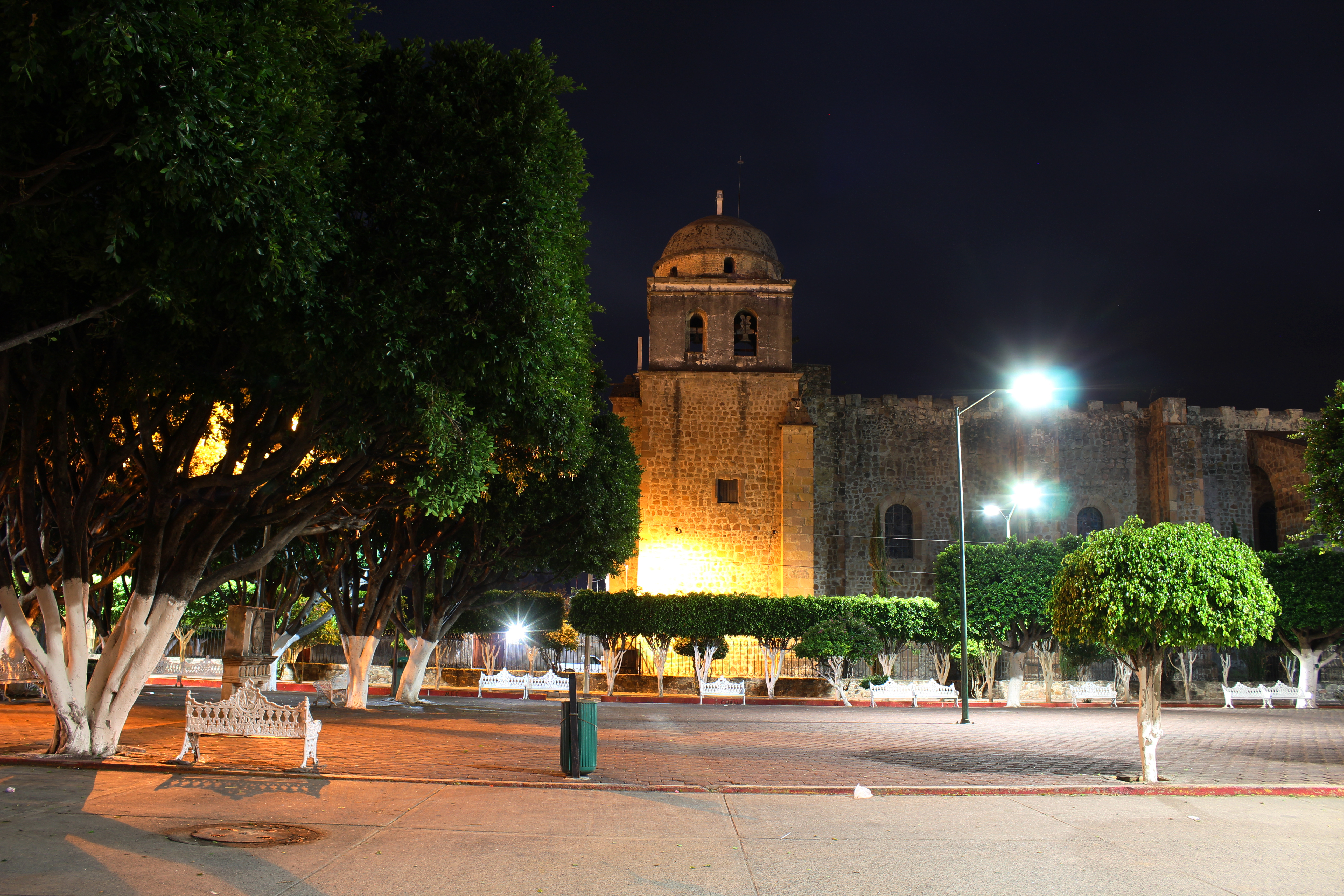 Ex-convento agustino en Copándaro del siglo XVI